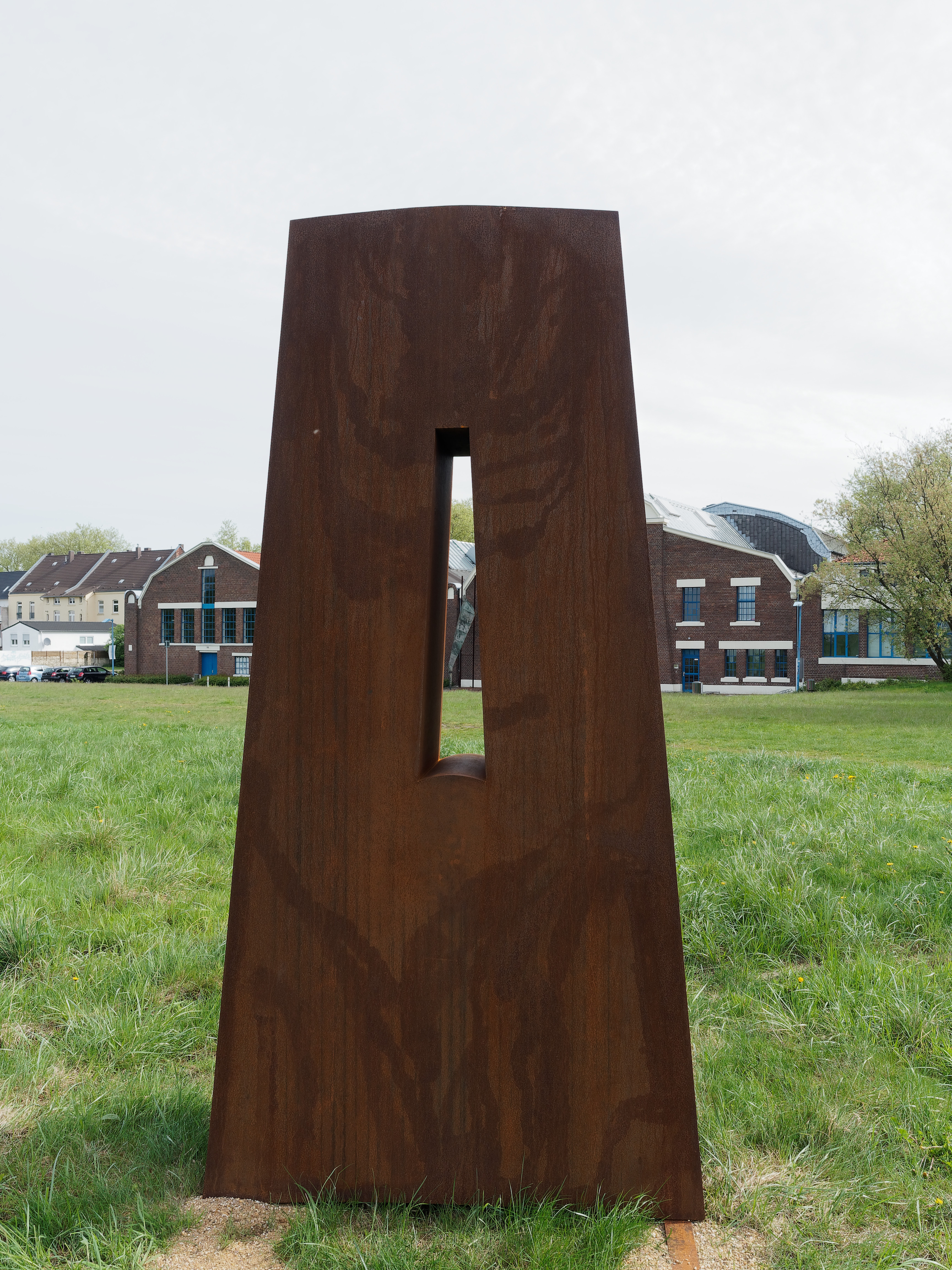 Eine hohle Skulptur aus Corten-Stahl von Enrique Asensi im Flottmannpark in Herne.